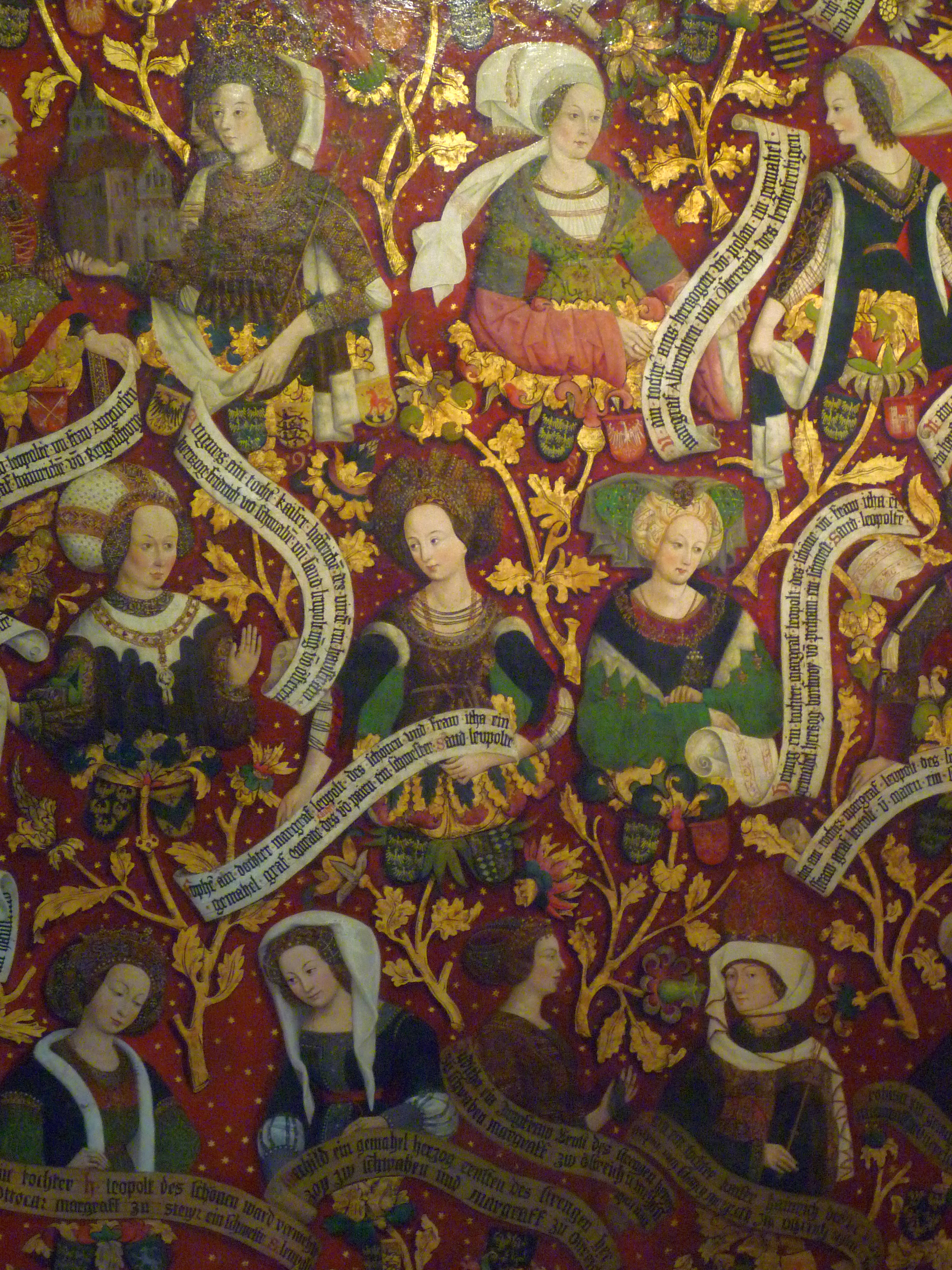 Detail des Babenberger Stammbaums in Stift Klosterneuburg (1489-92): Frauen der Babenberger